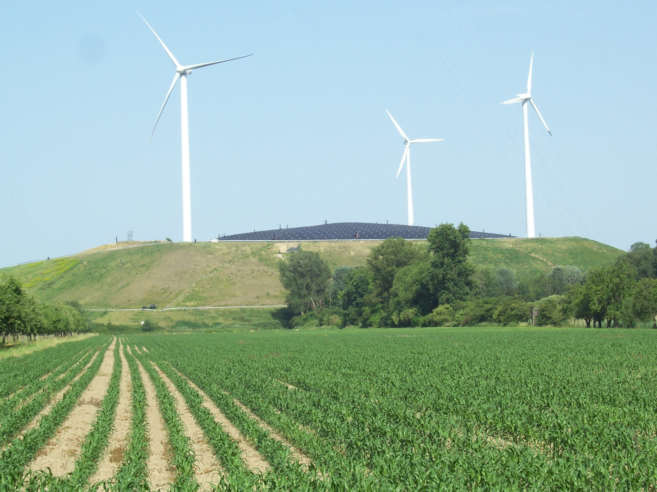 Energieberg (auch Windmühlenberg genannt). Ehemalige Mülldeponie West in Karlsruhe-Knielingen, auf der drei Windkraftanlagen, eine größere Photovoltaikanlage und ein Block­hei­z­­­kraft­wer­k mit Deponiegas betrieben werden.